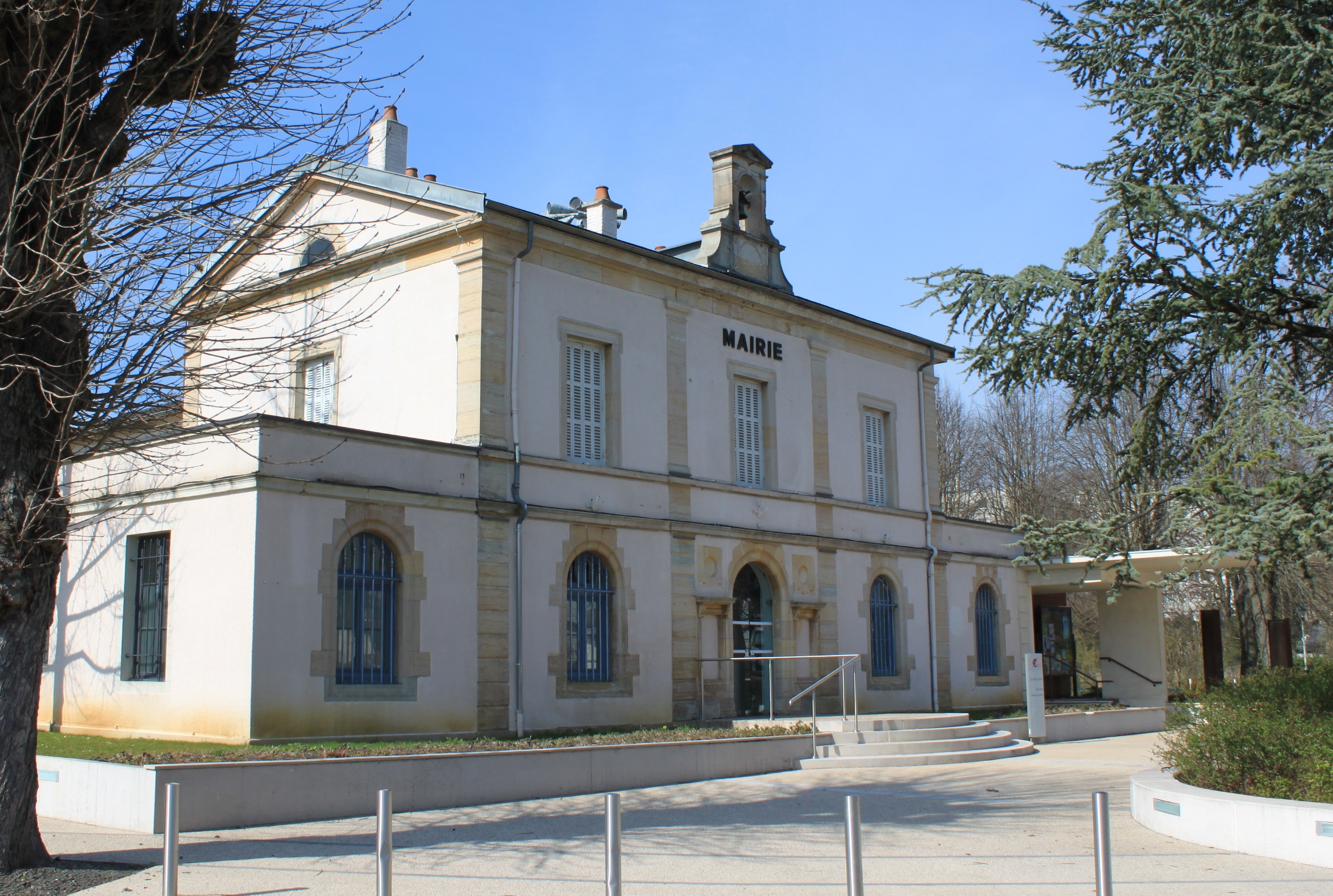 Longvic, Côte-d'Or, Bourgogne, France